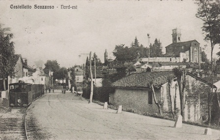 Castelletto Monferrato, tram